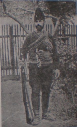 Павле Младенов